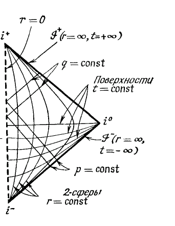 Диаграмма Пенроуза